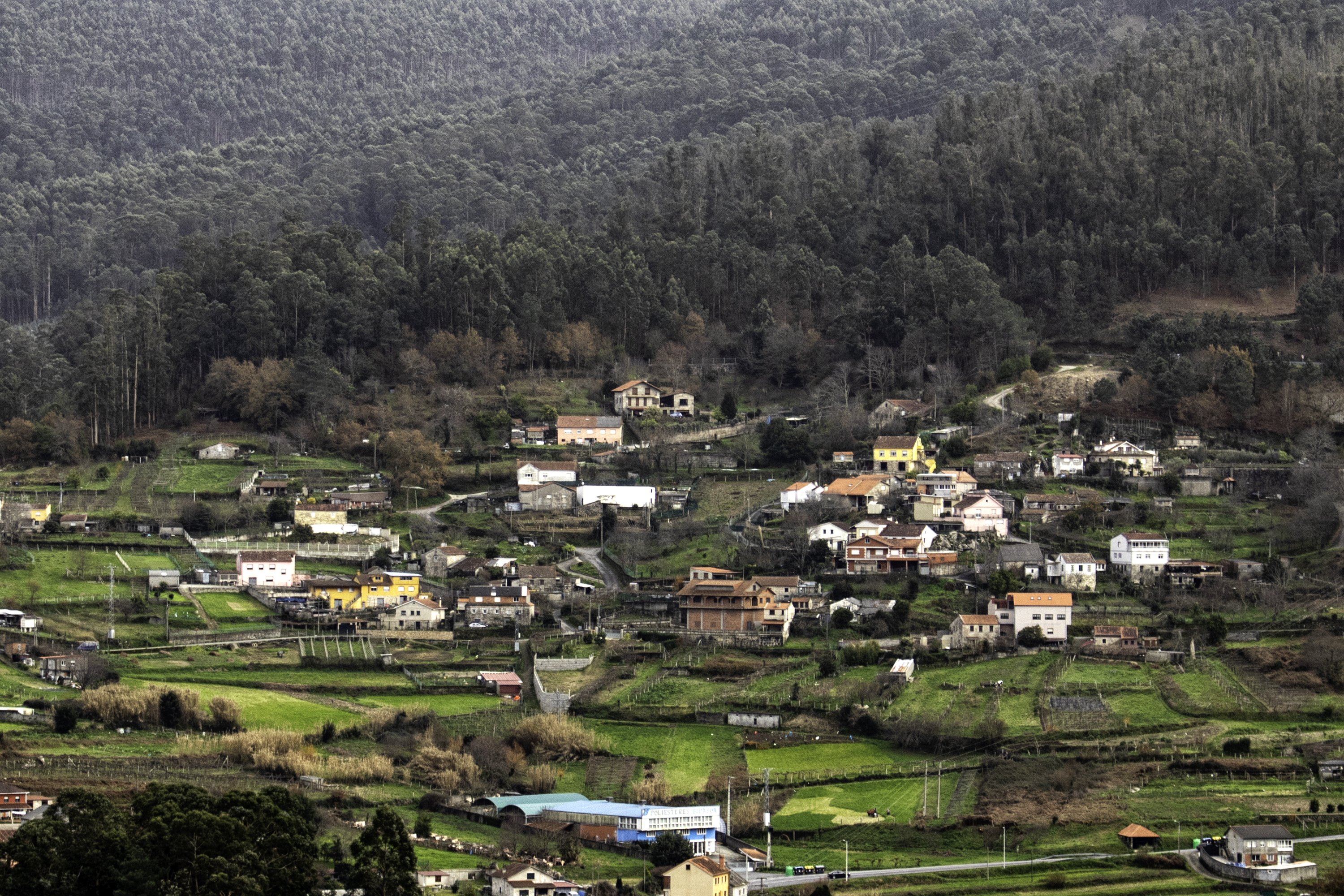 Lugar de Macenlle, Marín.